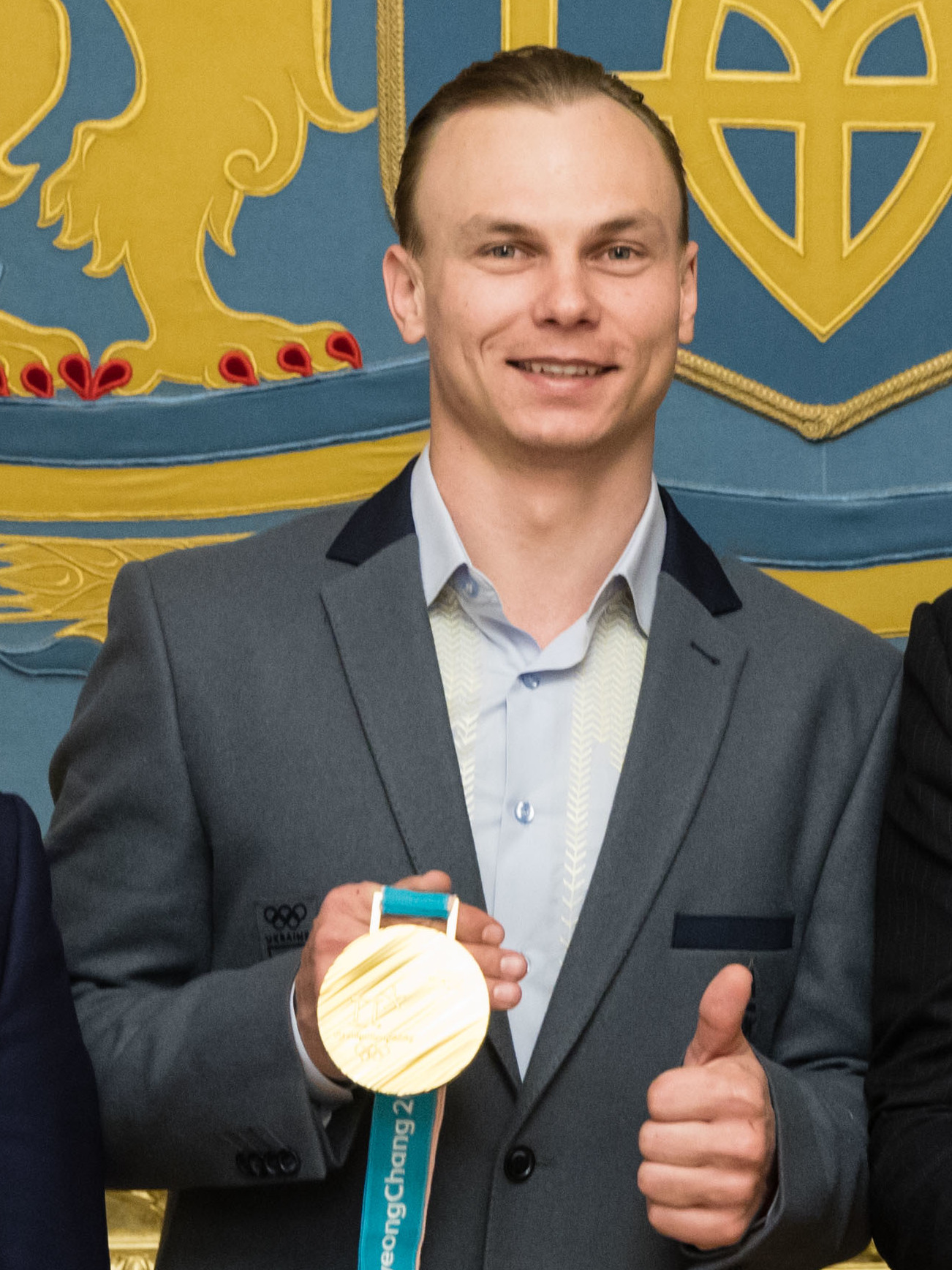 Олександр Абраменко